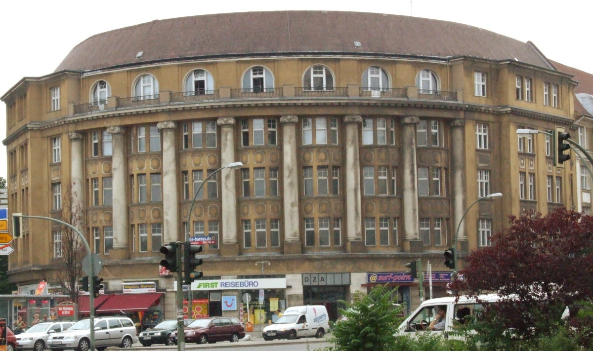 Wohn- und Geschäftshaus von Bruno Möhring (DZA, Deutsches Zentrum Altersfragen) am Platz der Luftbrücke in Berlin Fotograf: Harald Rossa Datum: Juni 2006